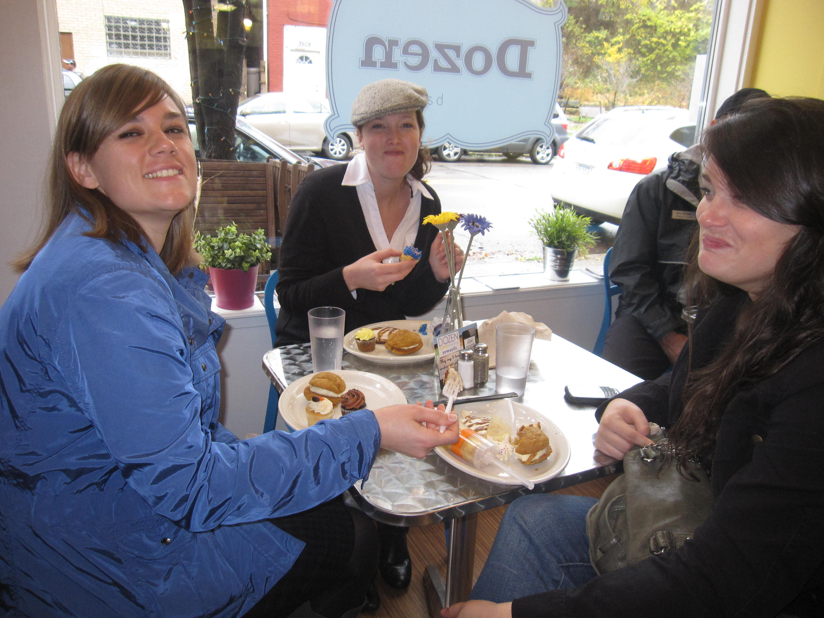 Bloggers at Dozen Bake Shop